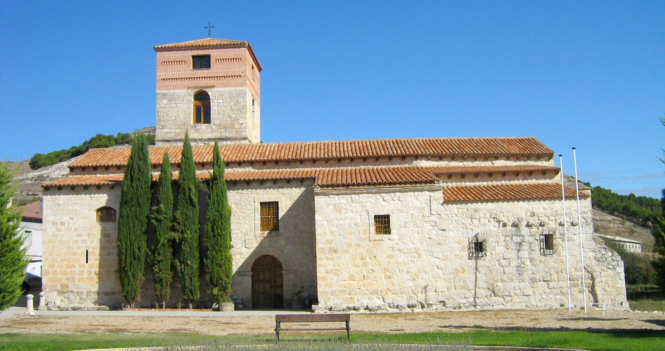 Curiel de Duero. Iglesia de San Martín. Valle del Cuco. Valladolid.